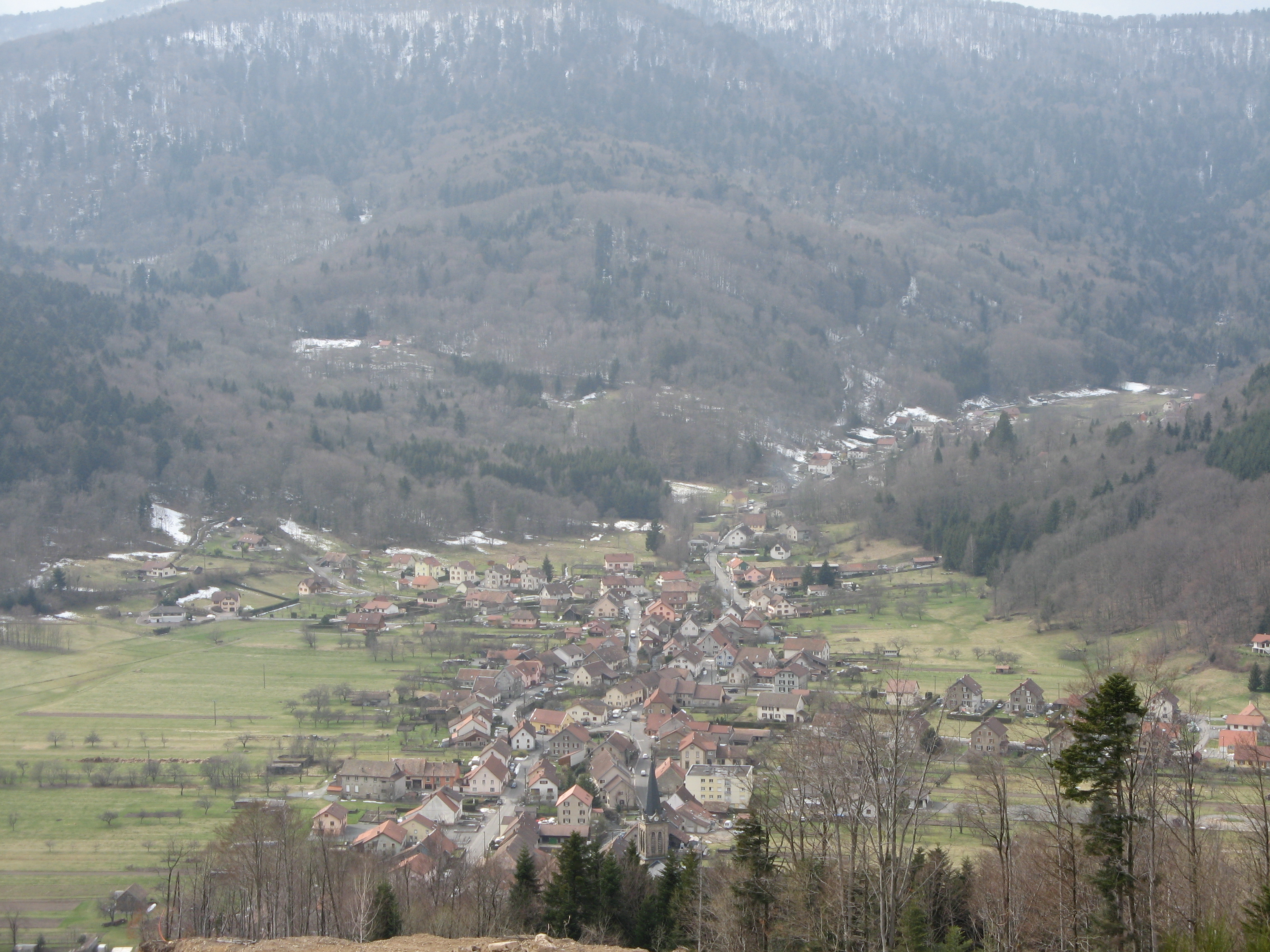 Lepuix-gy